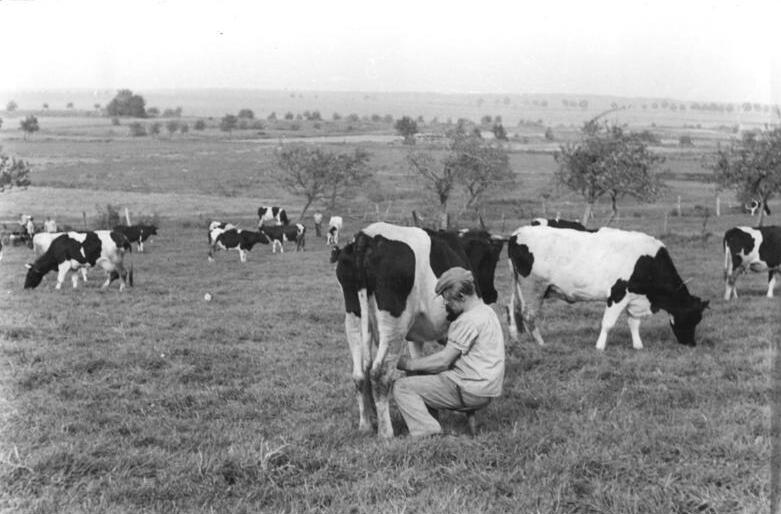 Bauer beim Melken auf der Weide Illus Kümpfel 15.12.1950 Milcherzeugung und Milchkontrolle. Unsere Serie zeigt, wie Milch in einer Molkerei der Volkseigenen Güter Berlins für die Verwendung als keimfreies, einwandfreies Nahrungsmittel behandelt wird. UBz: Im Sommer werden die Tiere im Freien gehalten. Die Milchgewinnung erfolgt ebenfalls auf der Weide.